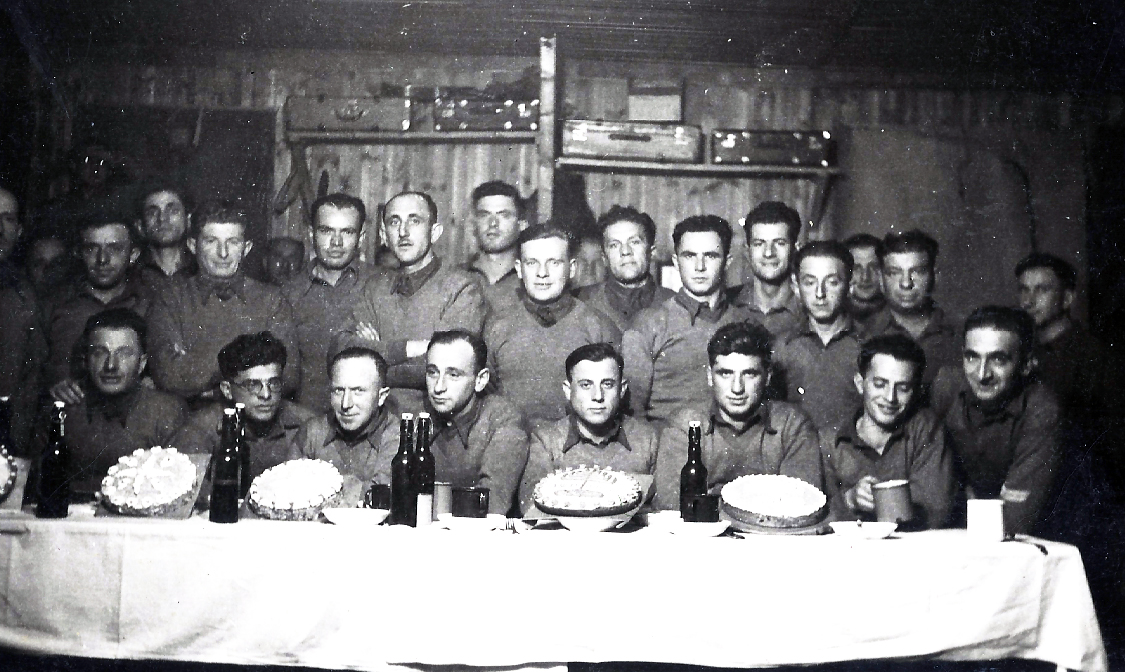 שבויים